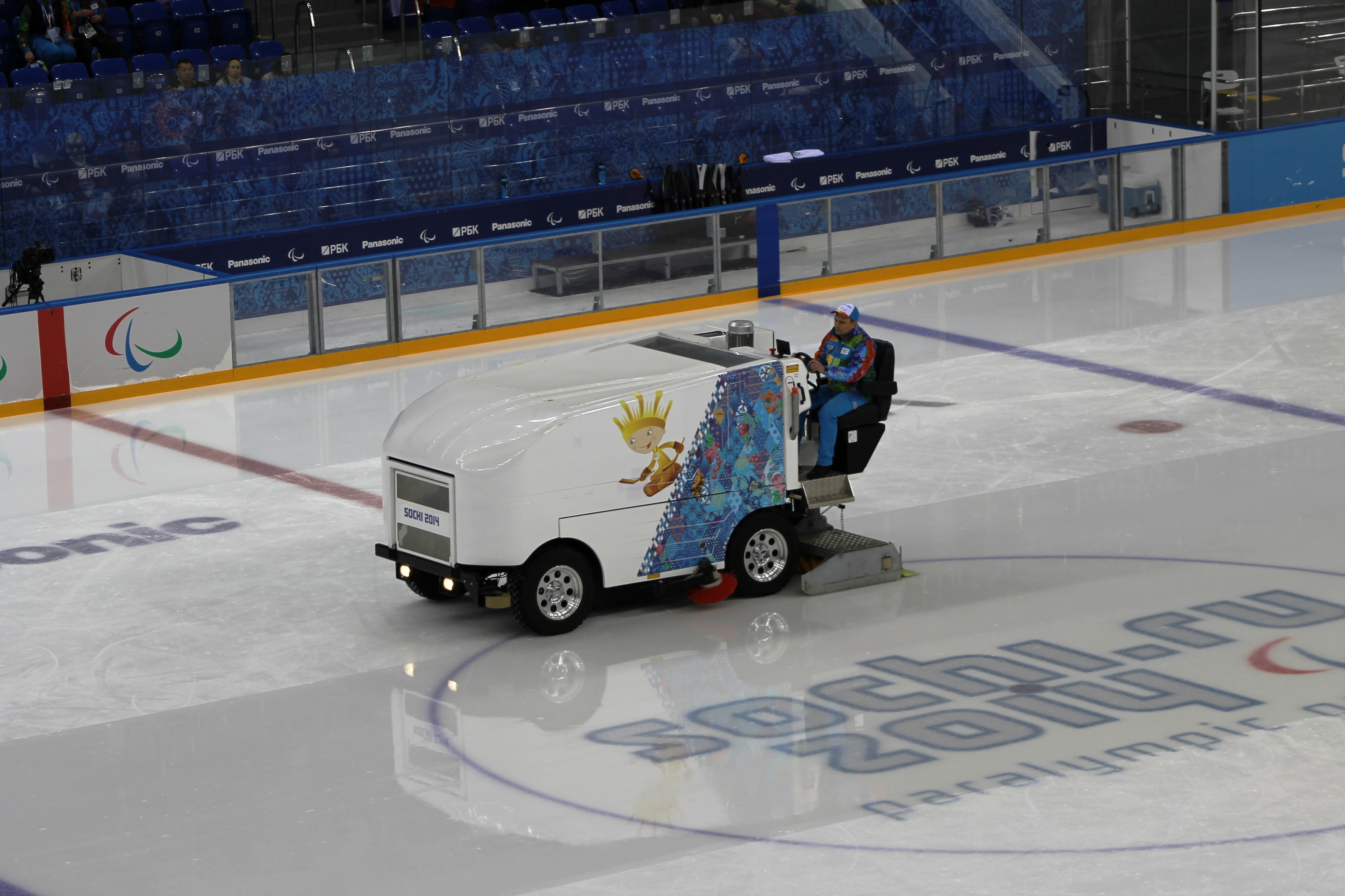 Подготовка льда на соревнованиях по следж-хоккею на Зимних Паралимпийских играх 2014 в Сочи. Ледовый дворец Шайба, март 2014